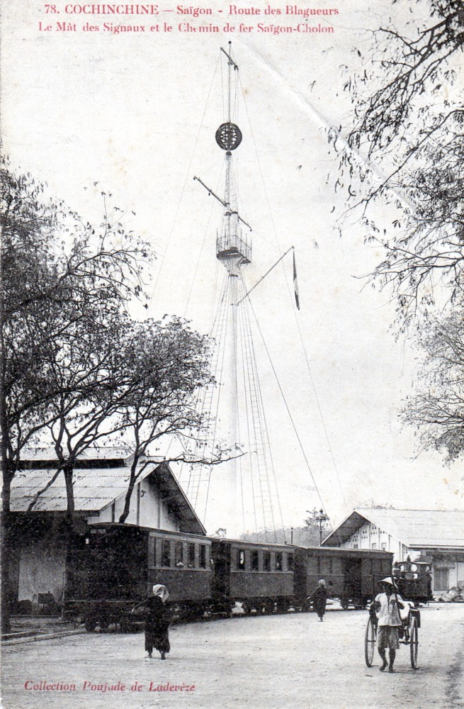 Le tramways de Saigon à Cholon par la route basse, avec une locomotive série 1 à 8